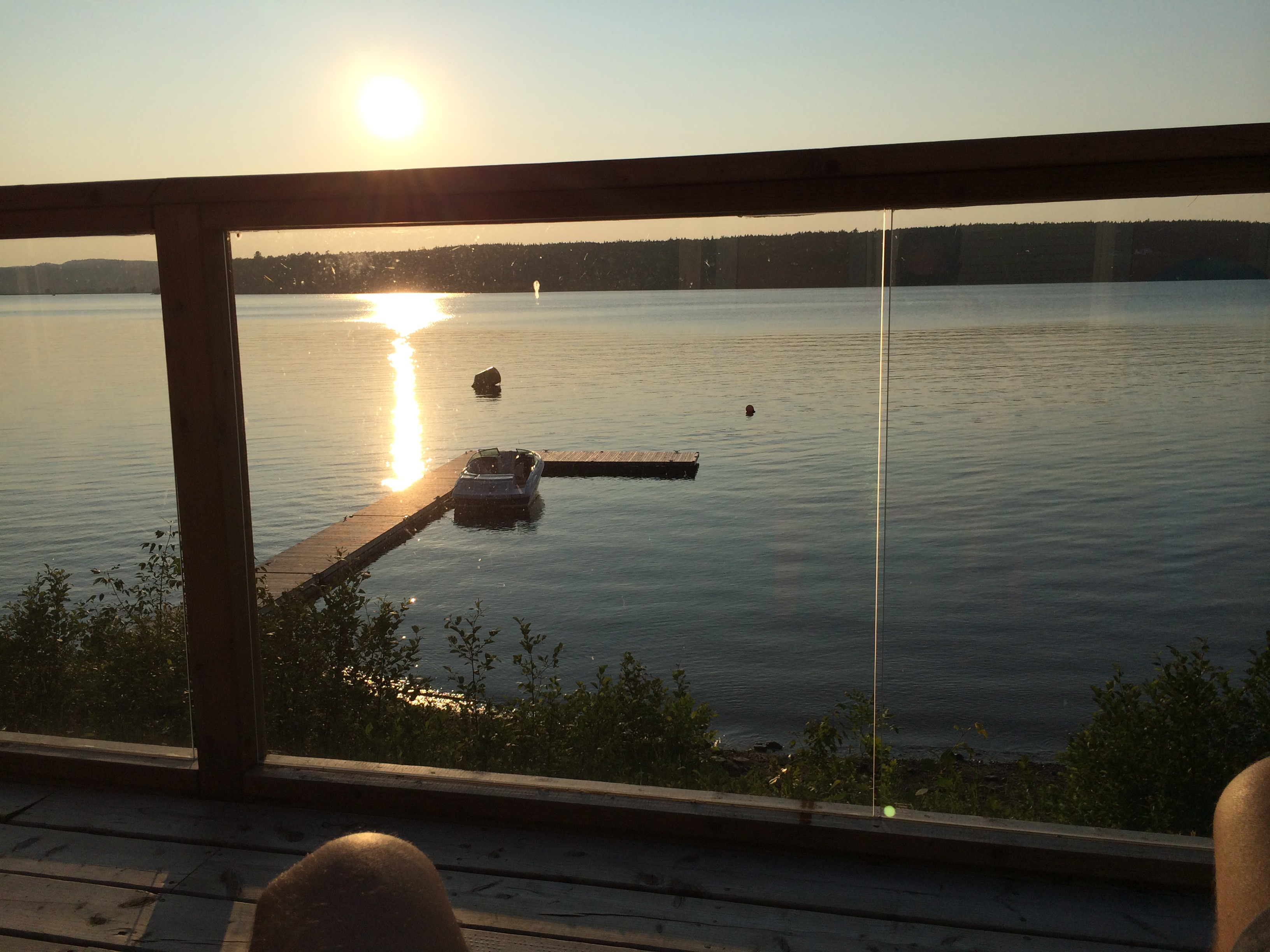 Belleisle Bay